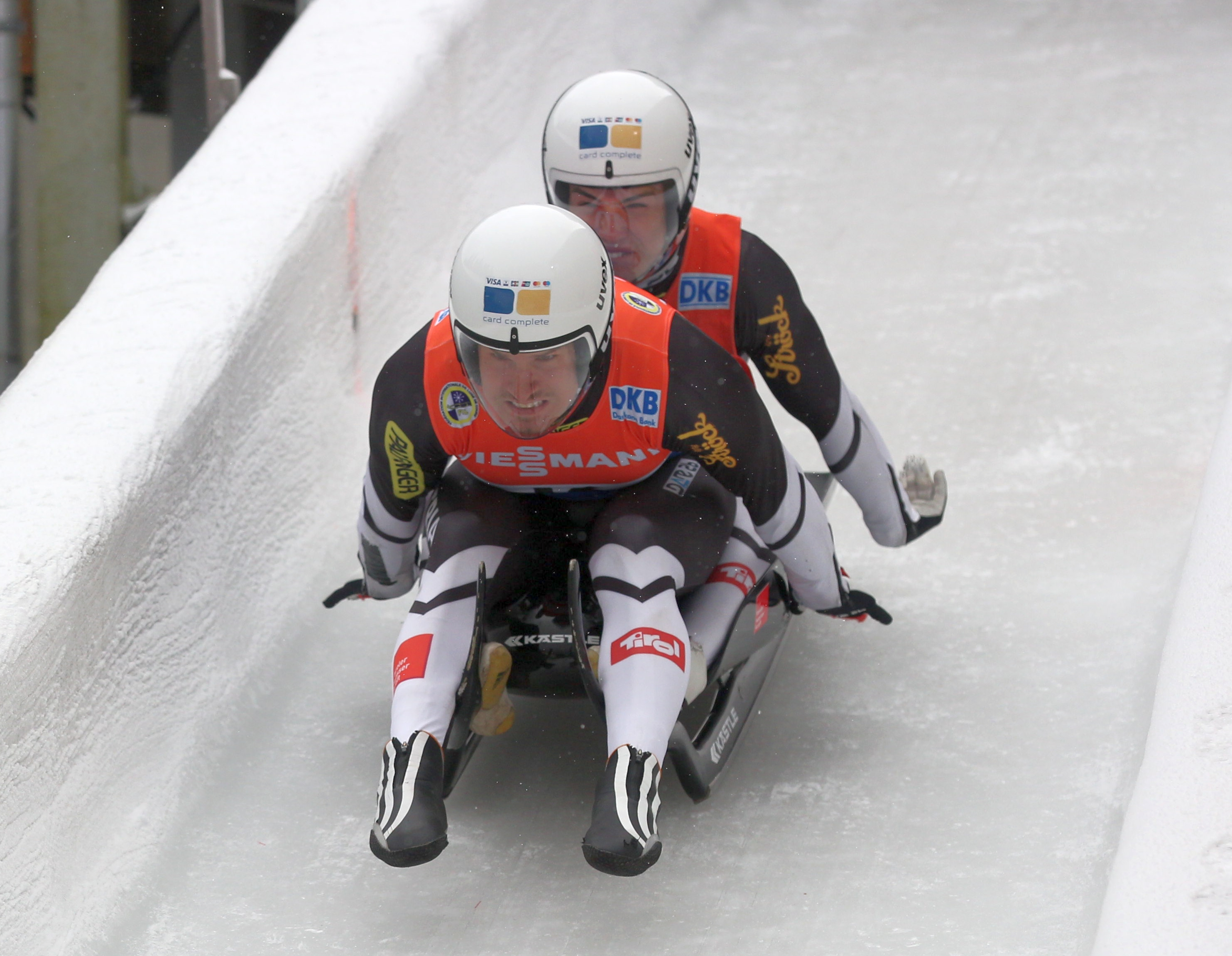 Thomas Steu und Lorenz Koller beim Training zum Rennrodel-Weltcup in Altenberg 2017